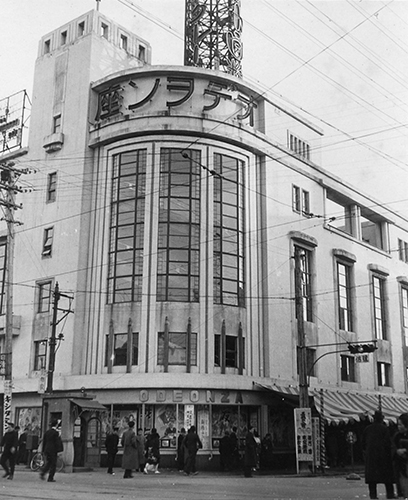 横浜市のオデヲン座。1911年開館。1936年新築。1973年閉館。